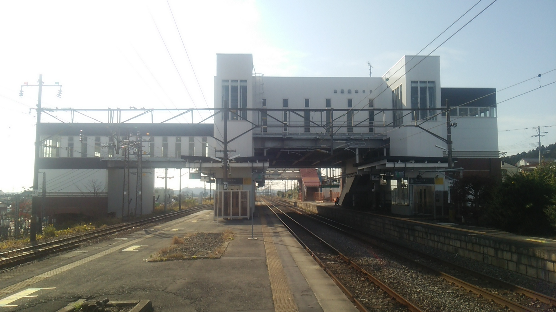 鹿島台駅ホーム